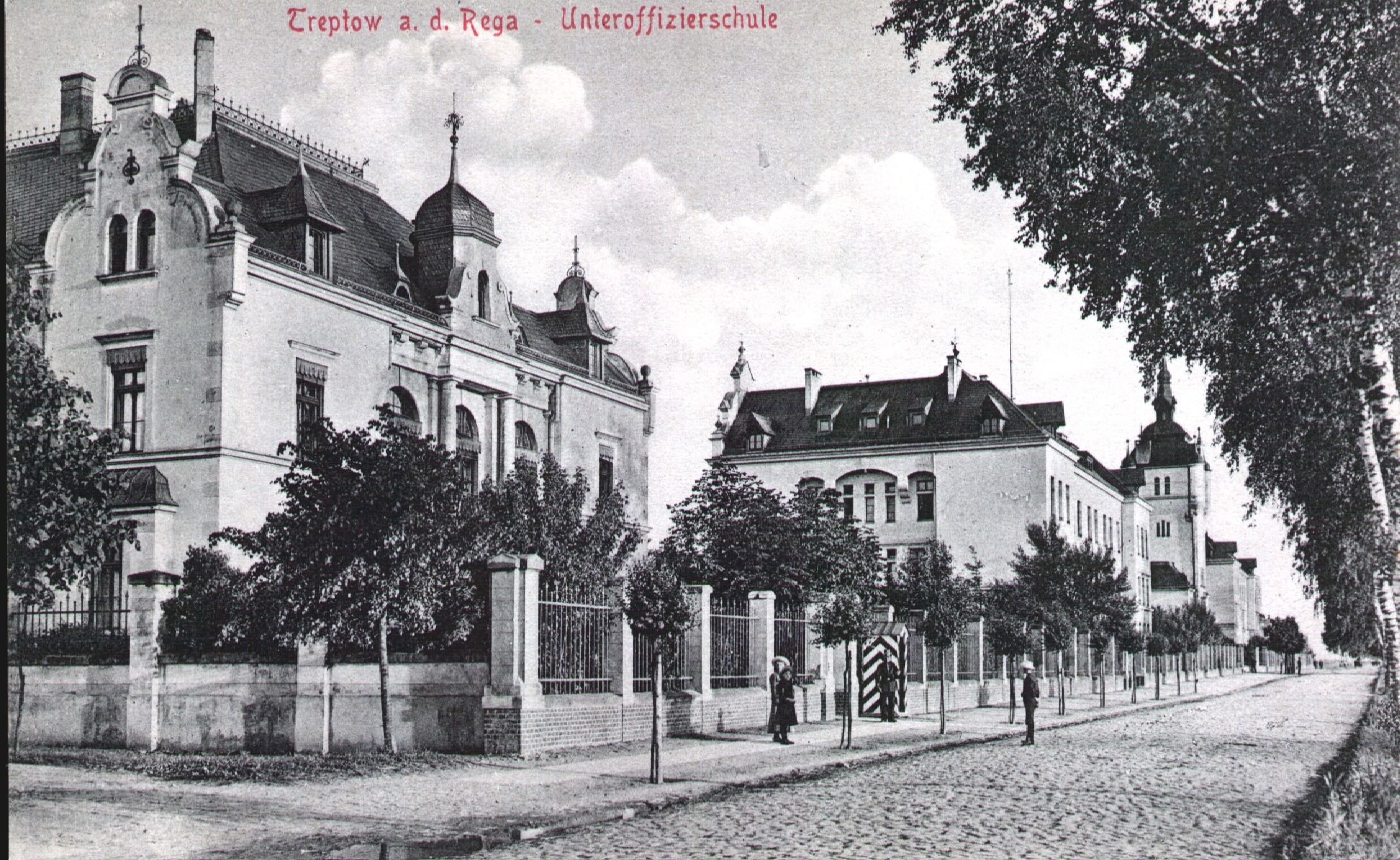 Trzebiatów przed II wojną światową.